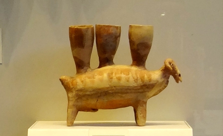 Chalcolithic Cornetl called Bazikh בָּזִיךְ (או בָּזֵךְ; באנגלית:) גביע (נקרא גם "גביע קרן") דמוי משפך, מהתקופה הכלקוליתית, אשר ככל הנראה שימש לפולחן. כלי נסך מעוצב כאיל ועליו שלושה בזיכים. נמצאו באתר בנגב ליד גילת. הלי מתוארך לתקופה הכלקוליתית 6,500-5,500 שנה לפני זמננו